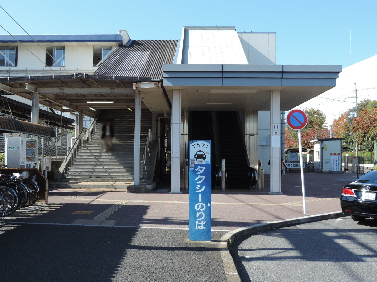 石山駅北口（2017年撮影）